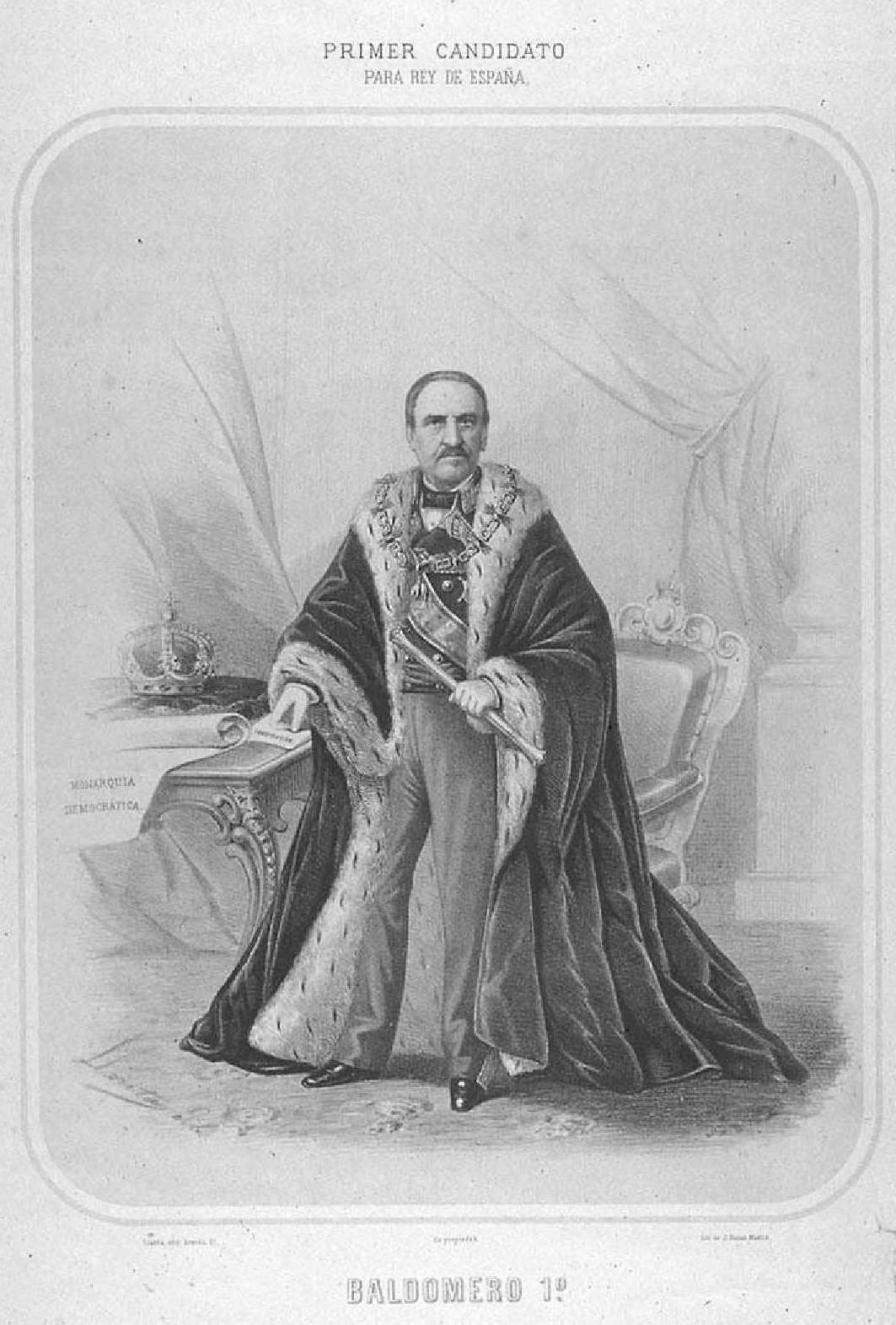 Retrato de Baldomero Espartero, litografía de Santiago Llanta Guerin estampado en la litografía de J. Donon. Inscripción: "Primer candidato para rey de España/ Baldomero 1º". Bibliotteca Nacional de España.